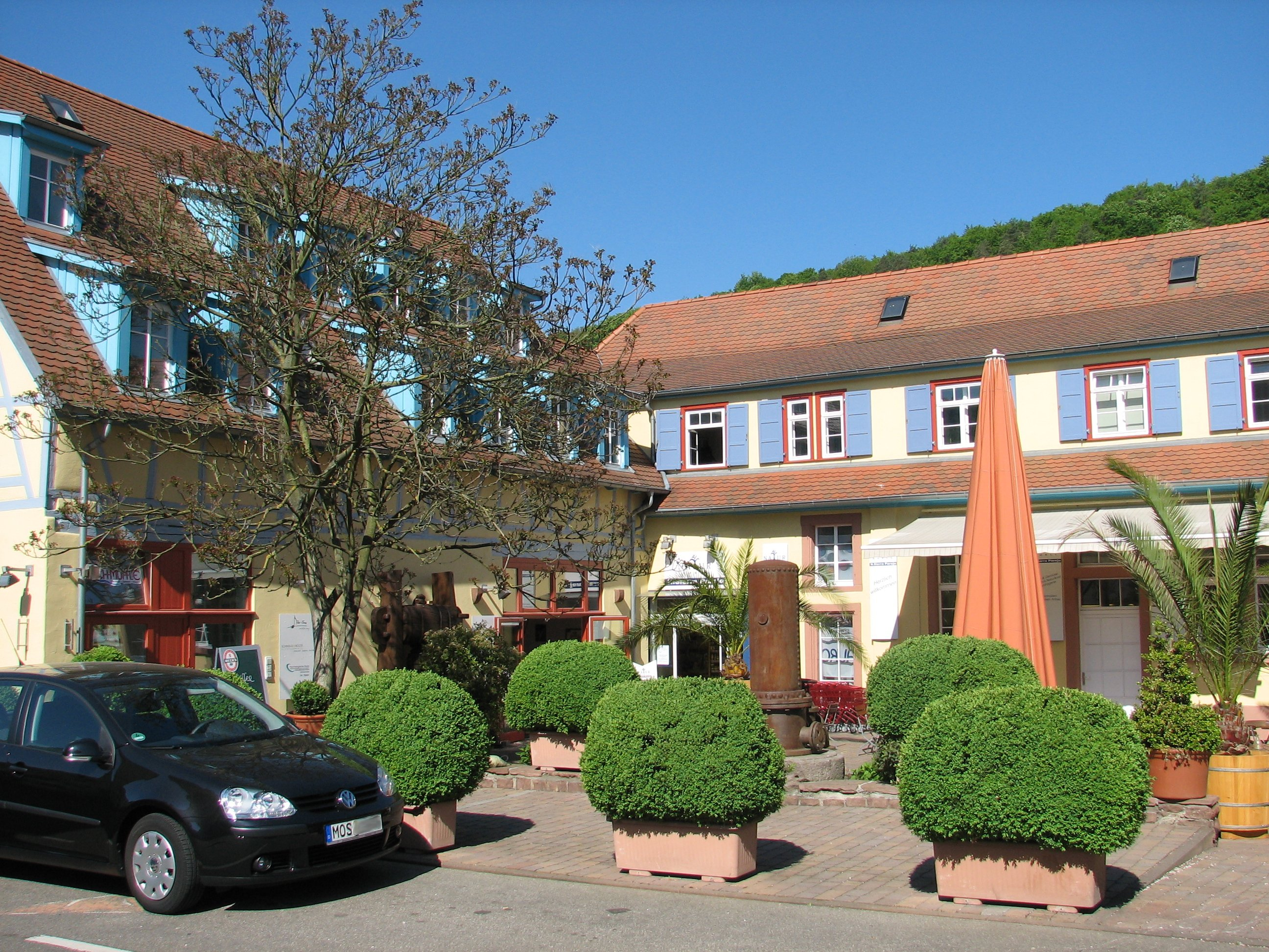 Bachmühle in Mosbach